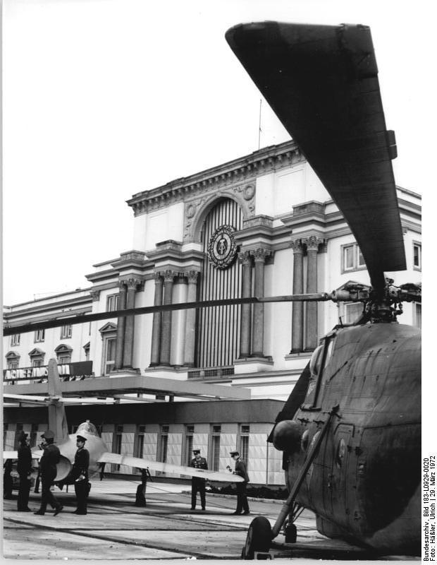 Dresden, Armeemuseum, Militärmuseum ADN-ZB Häßler 29.3.1972 Dresden: Armeemuseum der DDR eröffnet Am 25.3.1972 öffnete das Armeemuseum der DDR in der Elbestadt Dresden seine Pforten. Auf einem großen Freigelände und einer überdachten Fläche von über 4000 qm wird hier erstmals eine durchgehende museale Darstellung der revolutionären und militärischen Traditionen des deutschen Volkes - insbesondere der deutschen Arbeiterklasse - gezeigt.